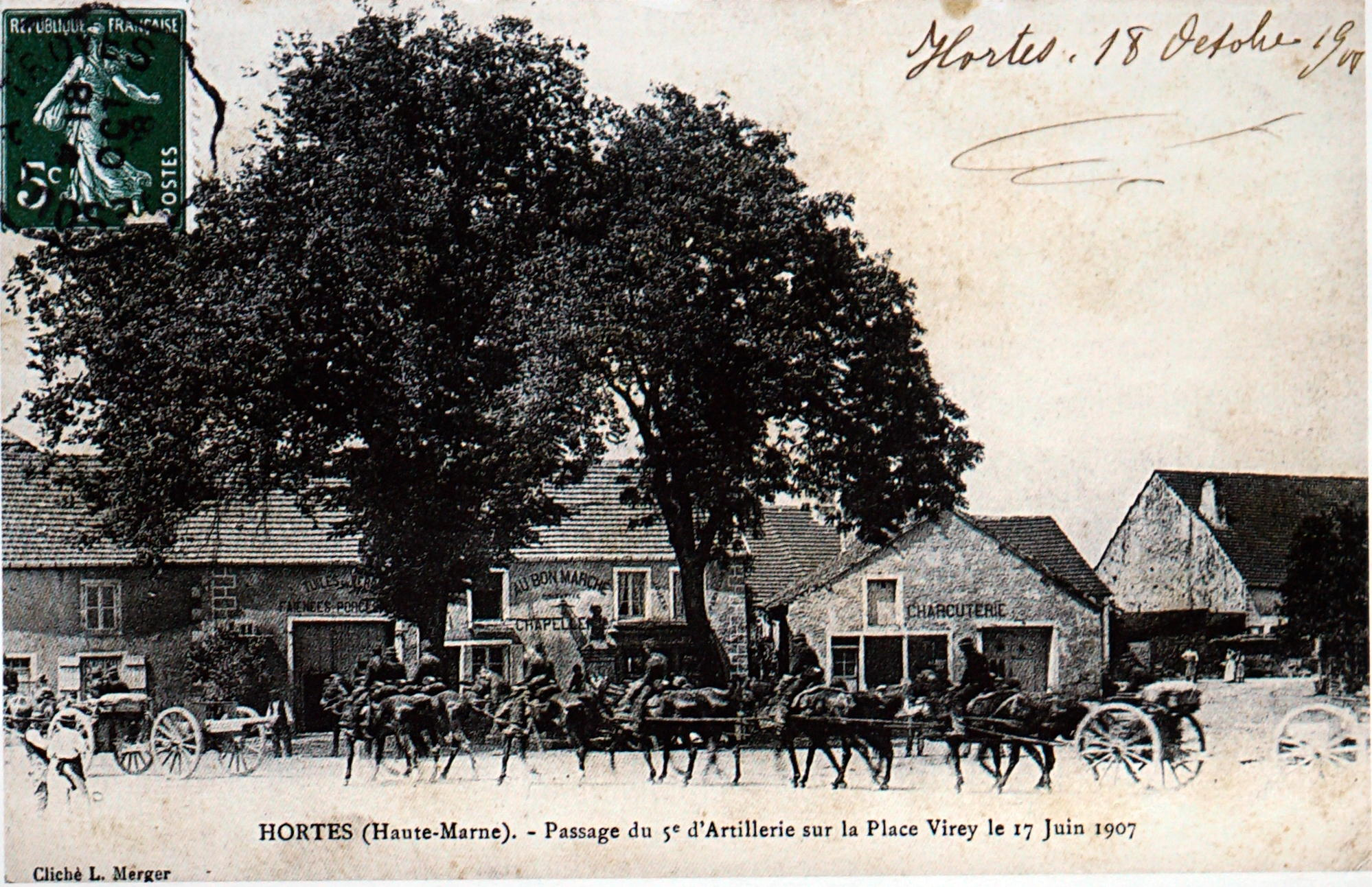 le 5e passant à Hortes.